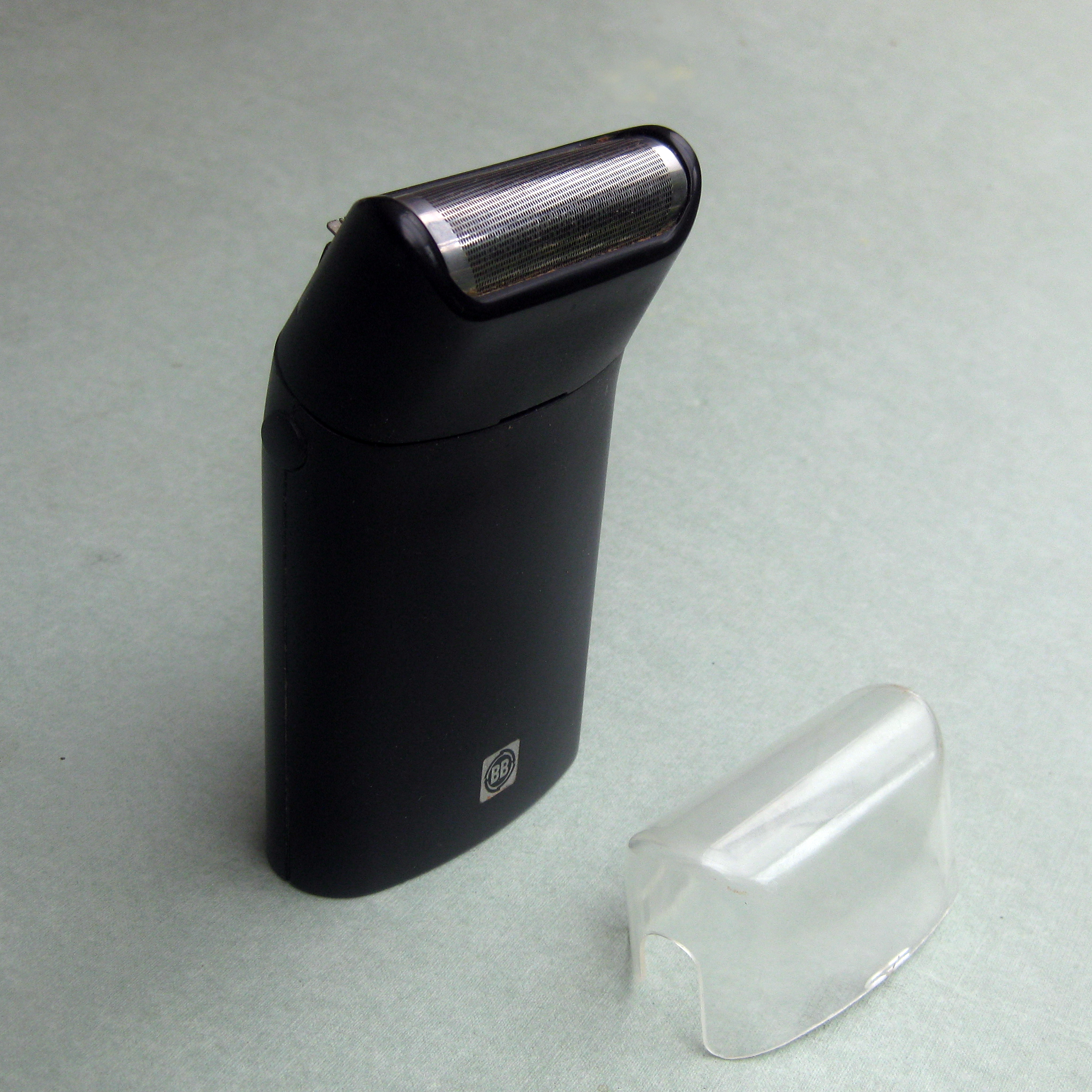 Elektrorasierer "bebo sher 2001" von VEB Bergmann Borsig, Berlin. Design: Bernd Haack